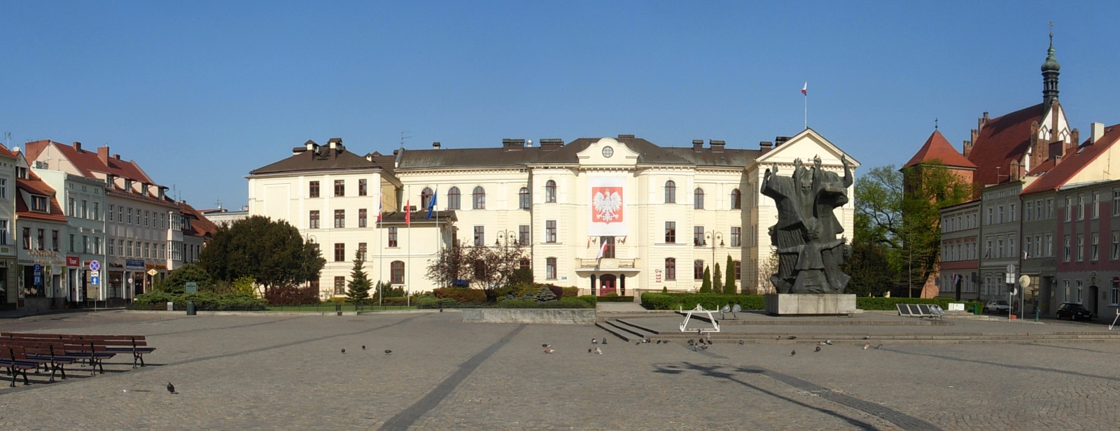 Ratusz w Bydgoszczy przy ul. Jezuickiej/Starym Rynku, dawne Kolegium Jezuickie (XVII w.)